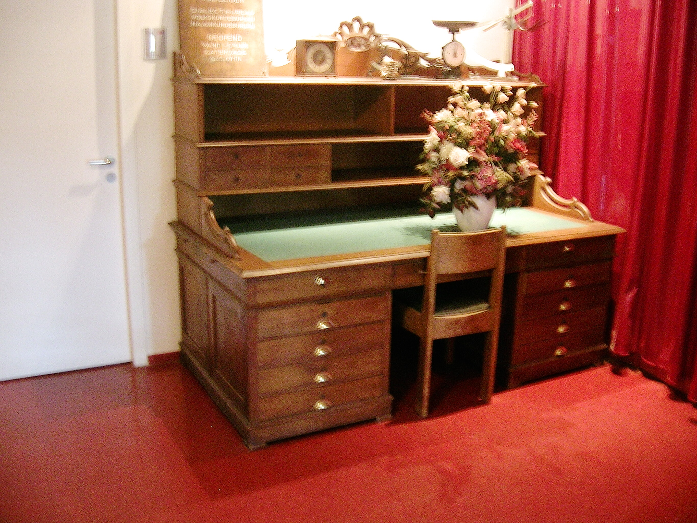 Bureau ministre muni d'un cartonnier